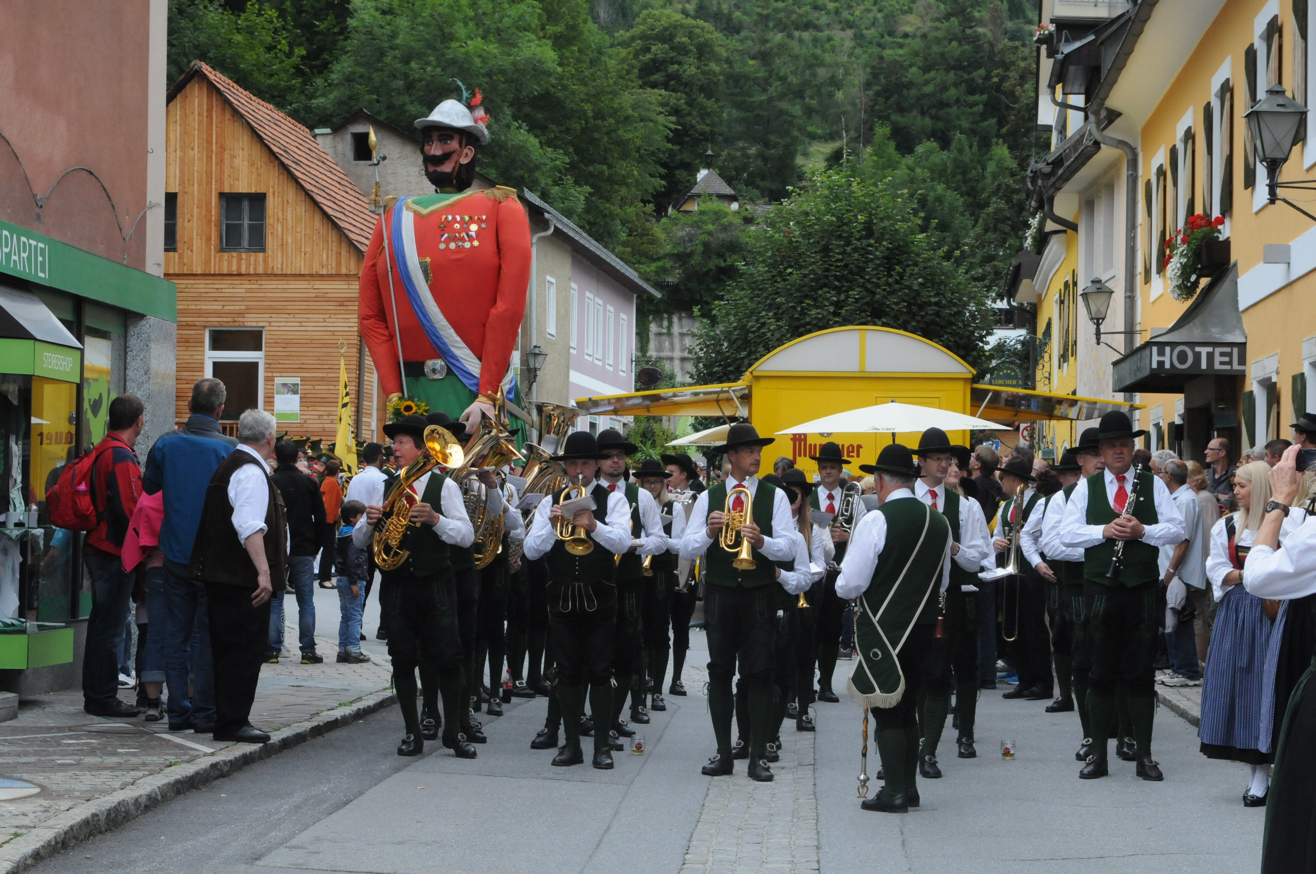 Samson II, Stadtkapelle Murau und Bürgergarde beim Samsonuzug am 15.August 2014